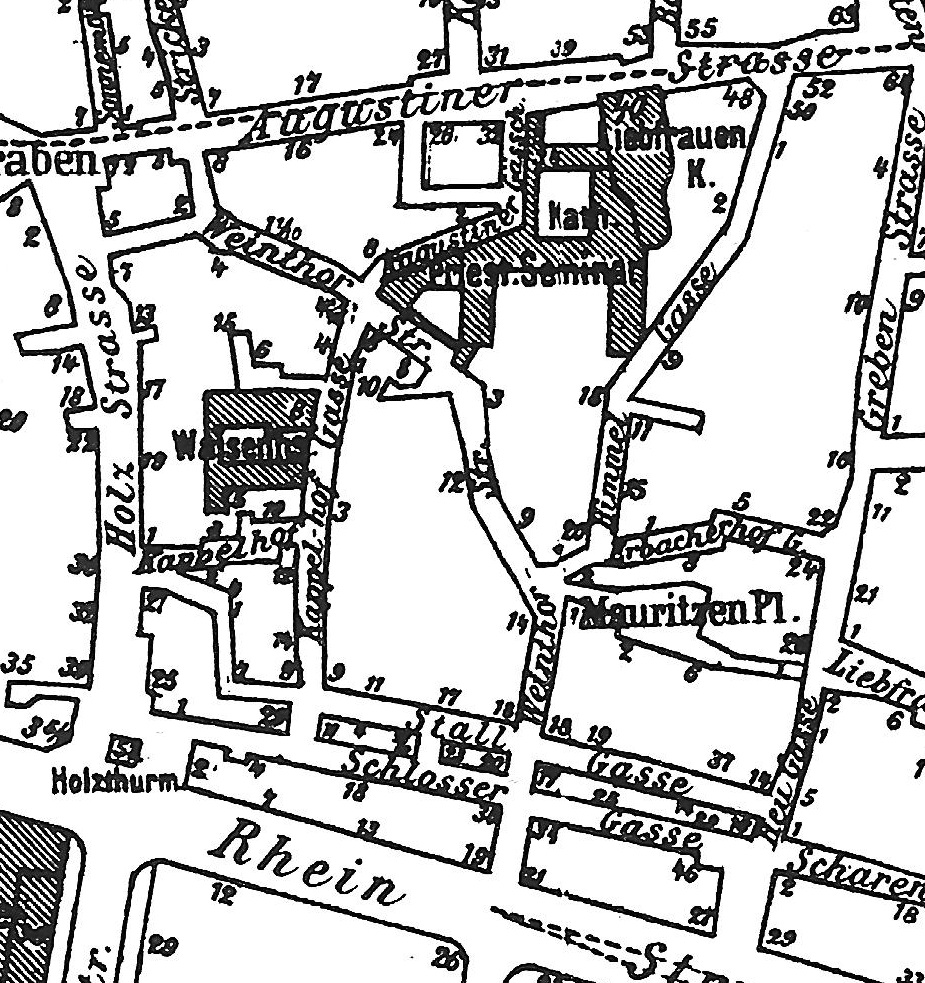 Gebiet rund um die Weintorstraße in Mainz 1894